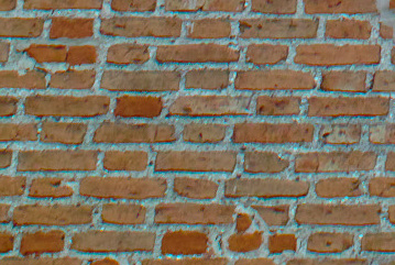 Беларуская (тарашкевіца): Царква абарончага тыпу. в. Сынкавічы This is a photo of Belarusian heritage monument. Reference number: 410Г000282 ( WLM)